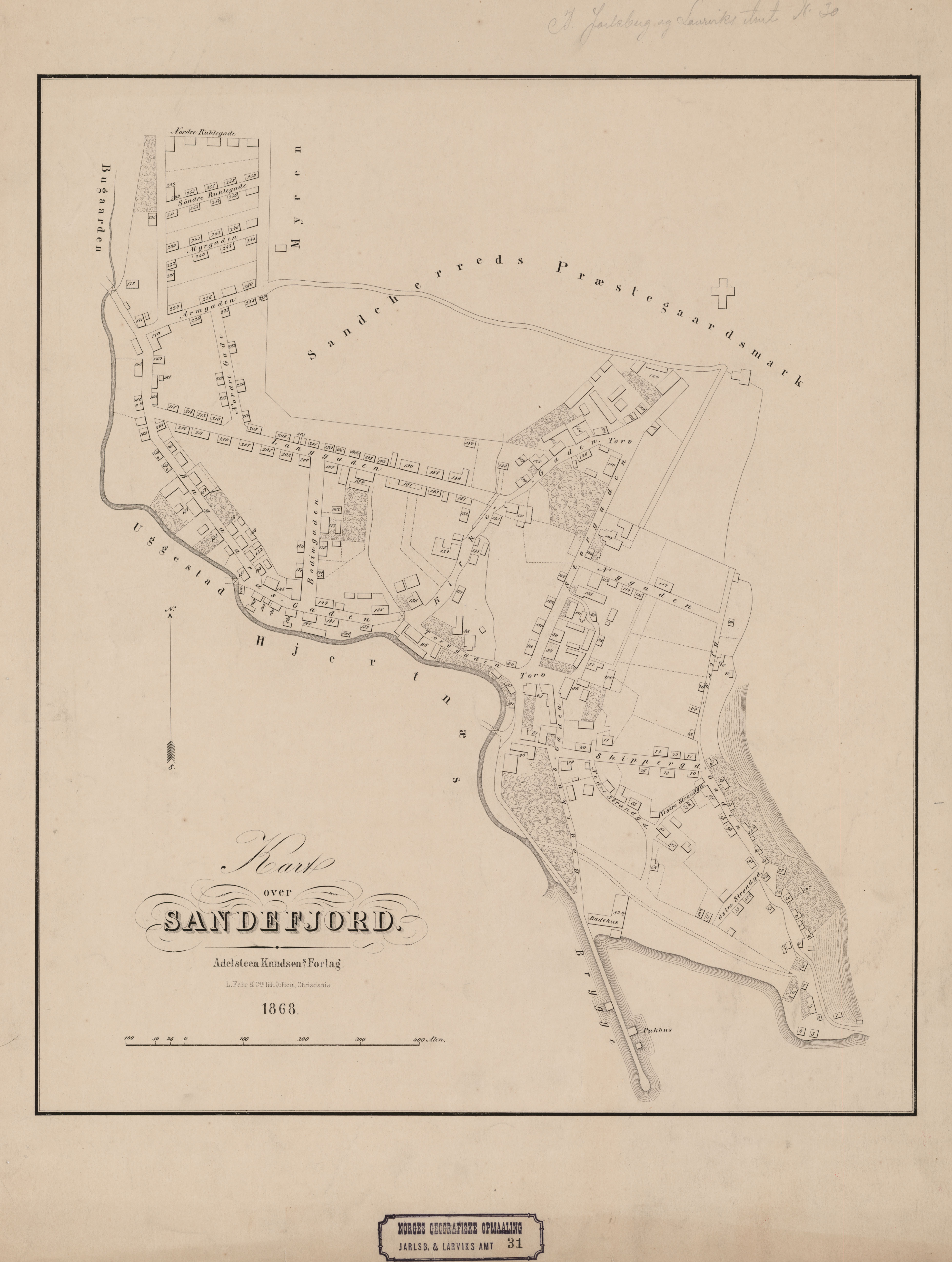 Kart over Sandefjord. Lit. A. Knudsens Forlag.